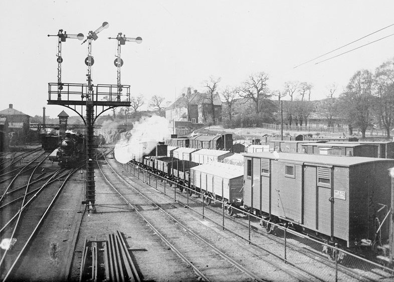 Liljeholmen. Stationsområdet med godsvagnar